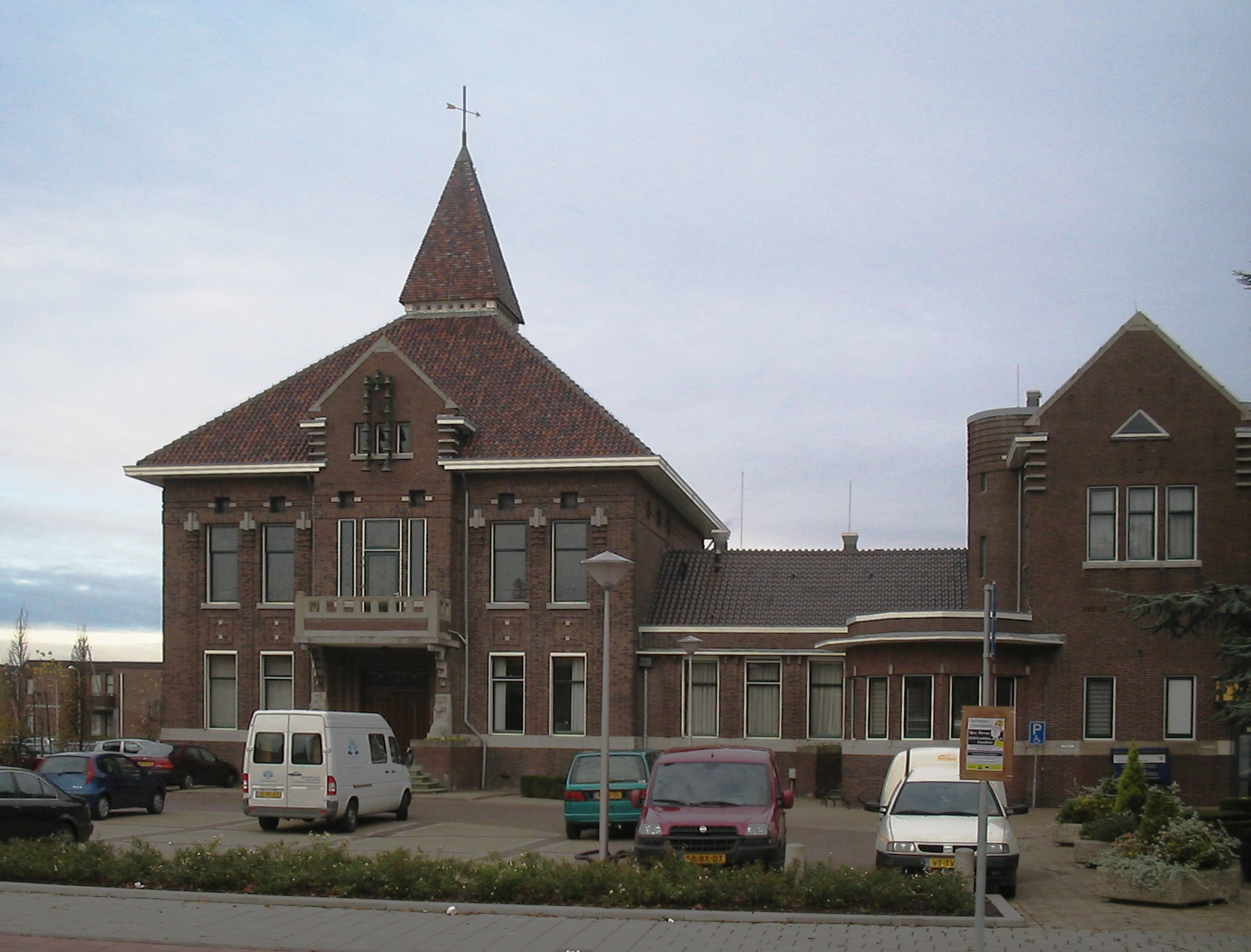 Boskoop stadshuis